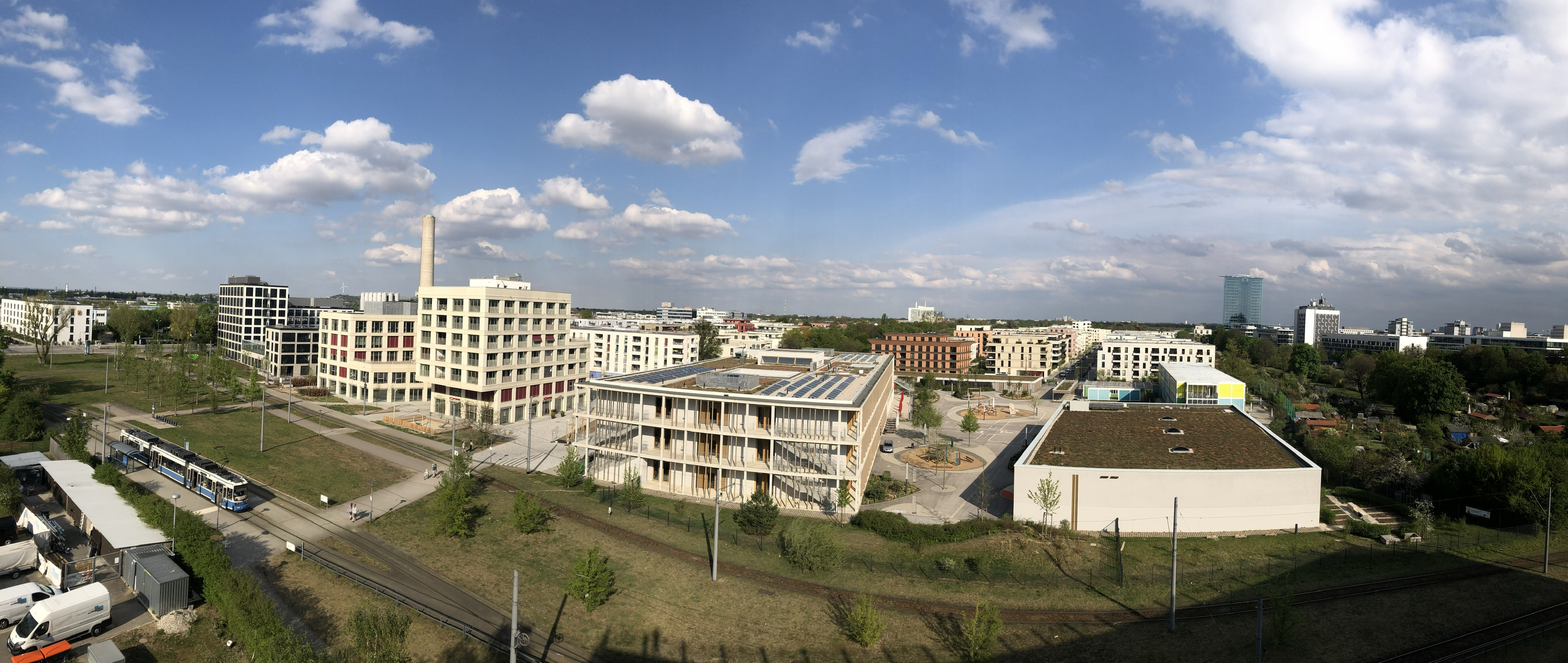 Domagkpark aus westlicher Sicht, vorne Tramstation Schwabing Nord sowie Gebäude am Bauhausplatz und Grundschule am Bauhausplatz